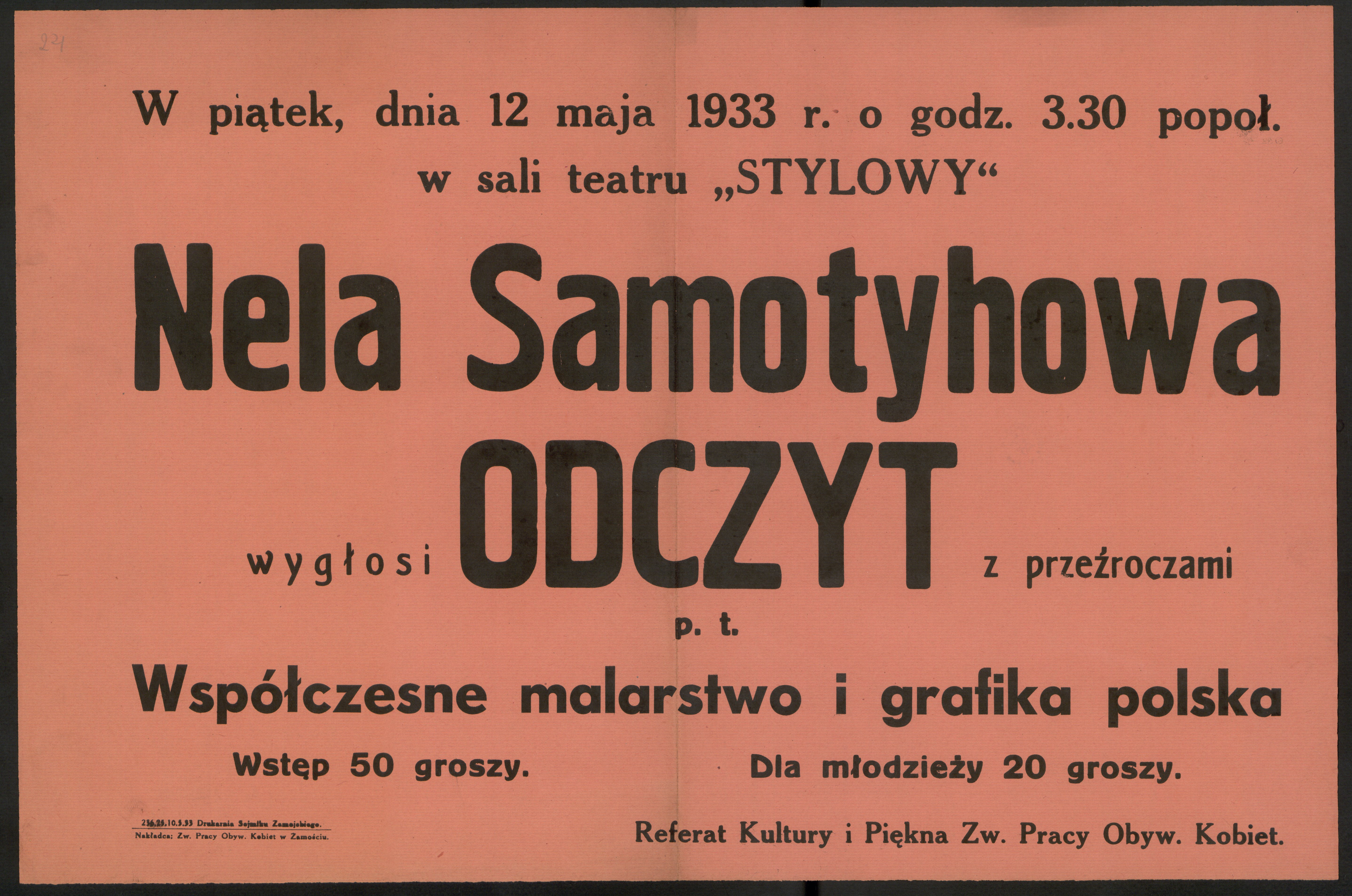 Afisz odczytu Neli Samotyhowej mającego miejsce 13 maja 1933 w sali teatru Stylowy. Wydano nakładem Zw. Pracy Obyw. Kobiet, 1933.